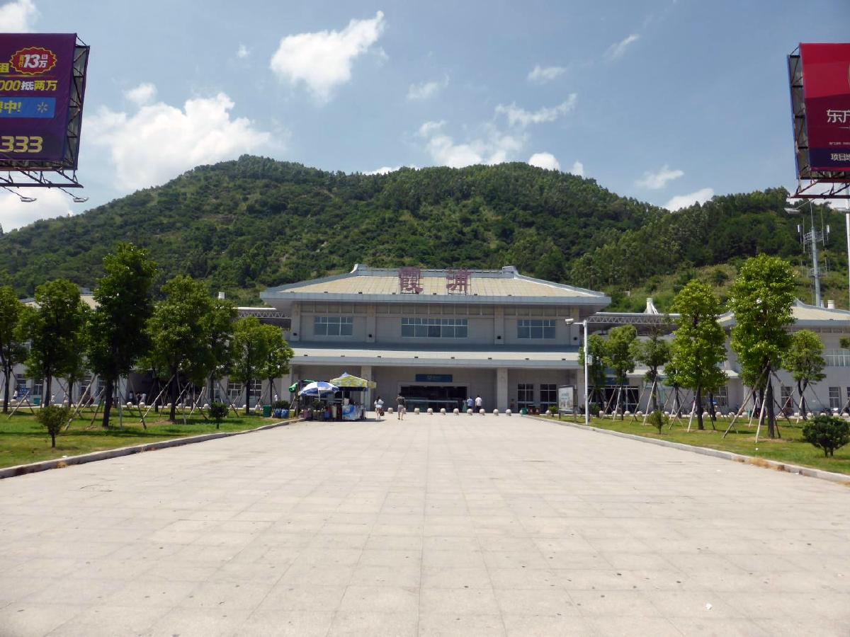 霞浦駅正面